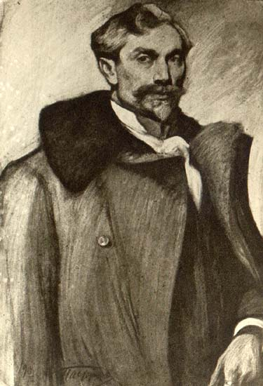 Автопортрет. ("Художник Л.О. Пастернак", художник т-ва Сытина) Полвека для книги 1866-1916. Литературно-художественный сборник, посвященный пятидесятилетию издательской деятельности И.Д.Сытина.- М.: Типография Т-ва И.Д.Сытина, 1916.